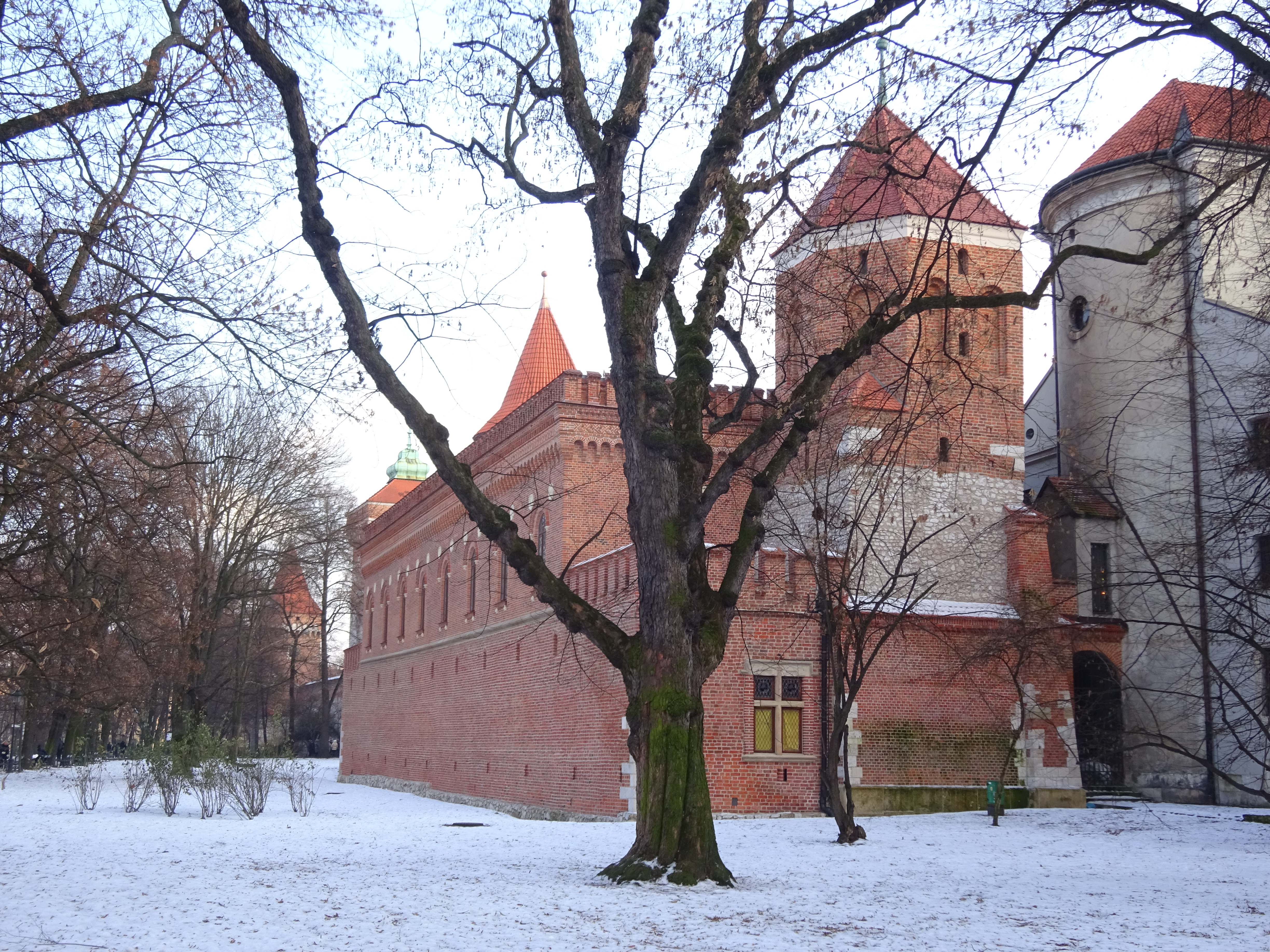 Mury miejskie w Krakowie. Ujęcie całego zachowanego fragmentu (bez Barbakanu) od strony Plant. 2017